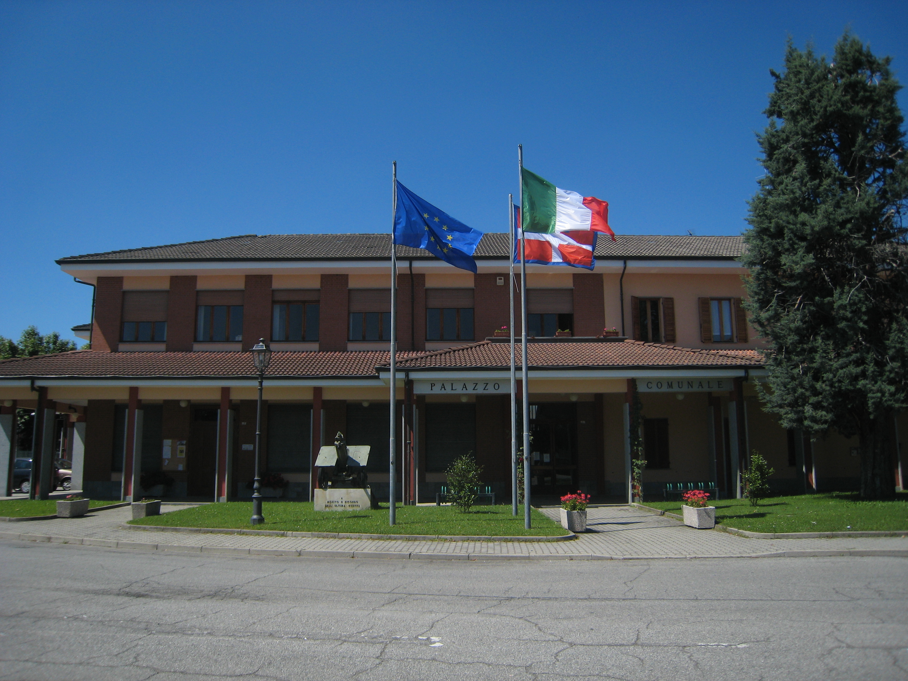 San Giusto Canavese (provincia di Torino): il Palazzo Comunale